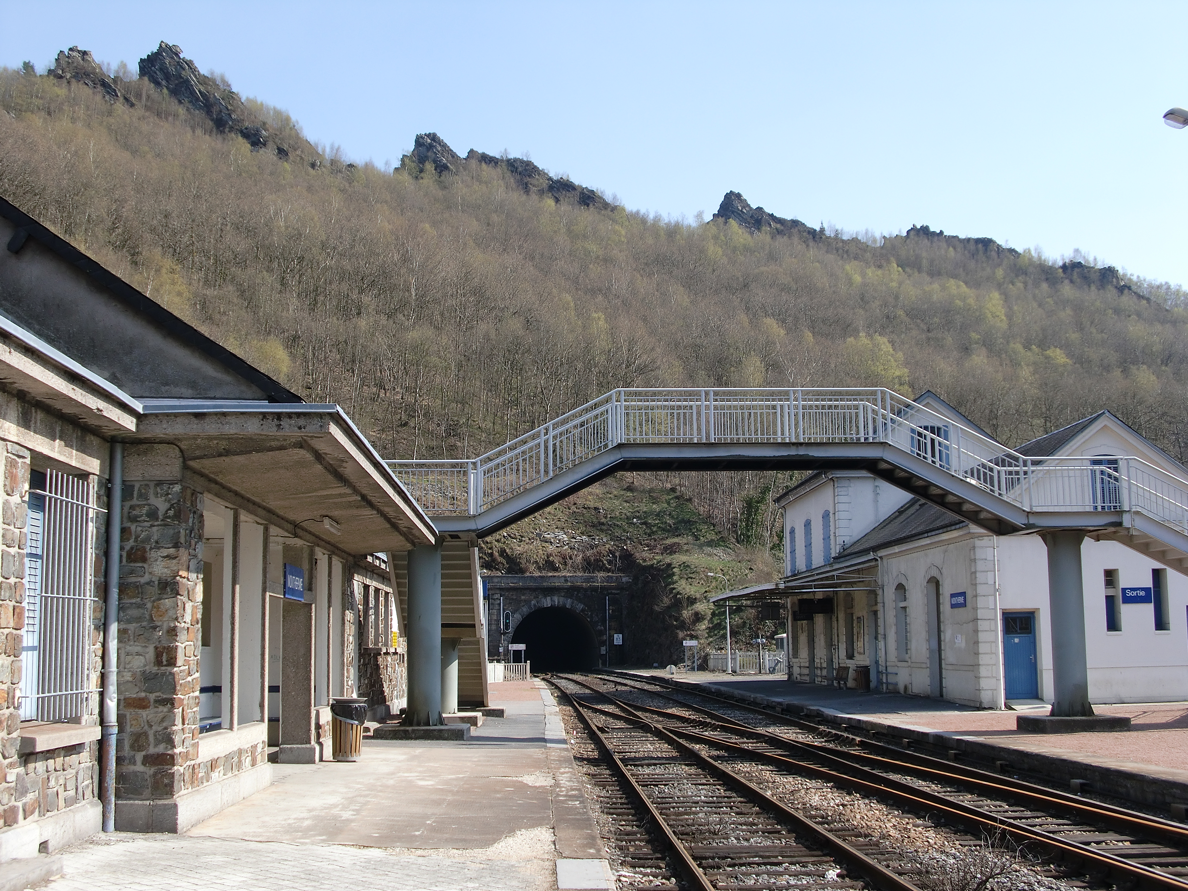 La gare de Monthermé vue du quai, avec les roches des Quatre Fils Aymon en arrière plan.